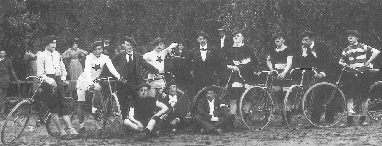 První fotografie zakladatelů Slavie z Národních listů. 1. předseda Jaroslav Hausmann je v baretu uprostřed.